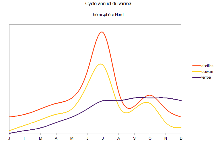 Alors que la population d’abeilles et de couvain décroissent à la fin de l´été, le nombre de varroa reste important. La pression parasitaire est des plus critiques lors des mois d’août à octobre.